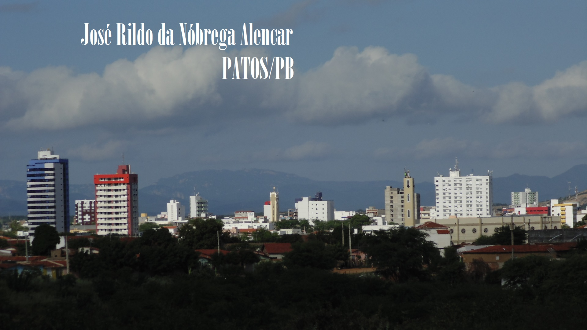 VISTA PARCIAL DE PATOS